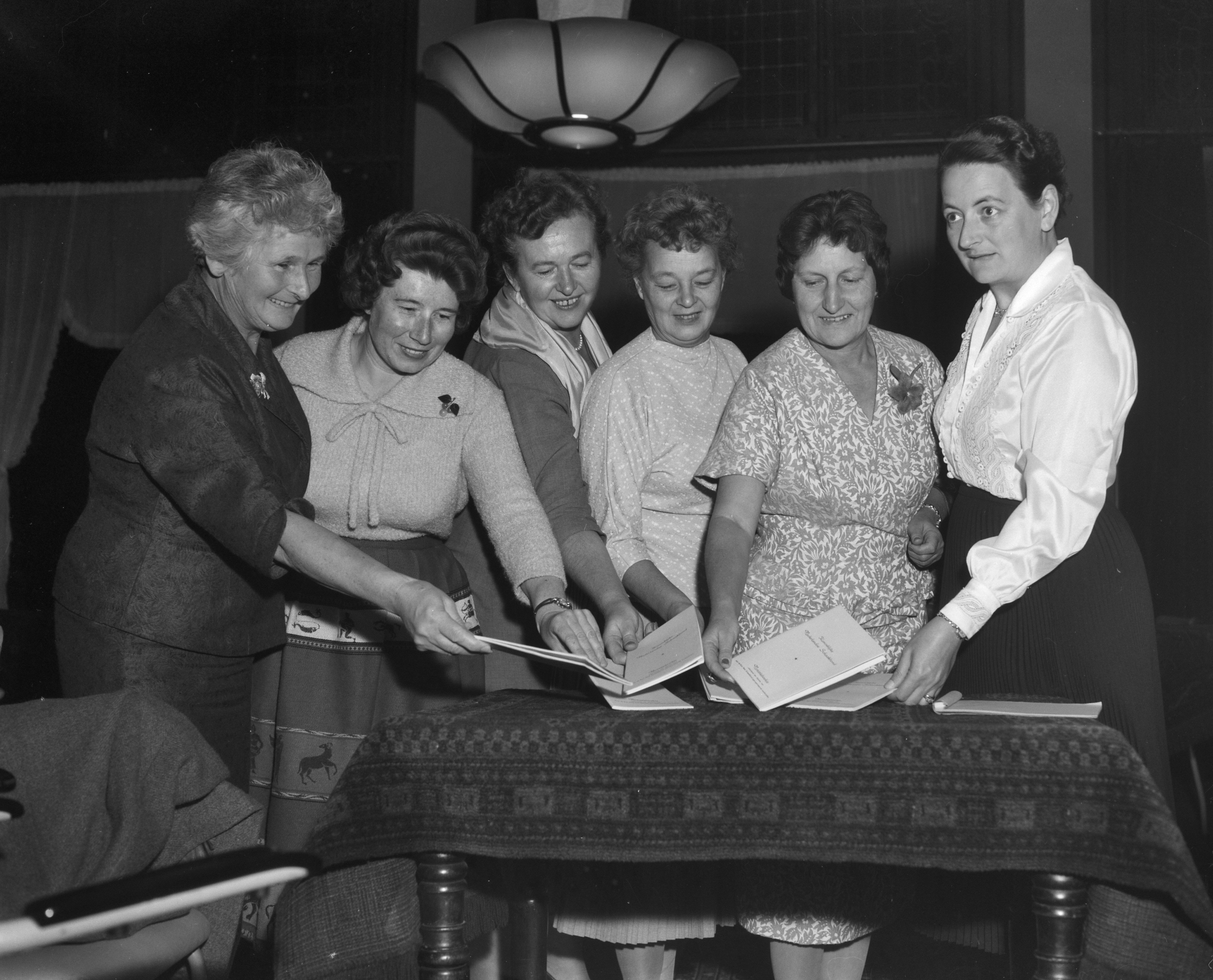 Collectie / Archief : Fotocollectie Anefo Reportage / Serie : [ onbekend ] Beschrijving : Opening Dames Danlon schaaktoernooi in Amsterdam, v.l.n.r. T. Roodzant, F. Heemskerk, I. Larsen , L. Timofeeva, E. Rinder, R. Bruce Datum : 21 oktober 1959 Locatie : Amsterdam, Noord-Holland Trefwoorden : groepsportretten, schaken Persoonsnaam : Bruce, Rowena Mary, Heemskerk, Fenny, Larsen, I., Rinder, Elfriede, Roodzant, Toos, Timofeeva. Lidia Fotograaf : Rossem, Wim van / Anefo Auteursrechthebbende : Nationaal Archief Materiaalsoort : Negatief (zwart/wit) Nummer archiefinventaris : bekijk toegang 2.24.01.04 Bestanddeelnummer : 910-7634